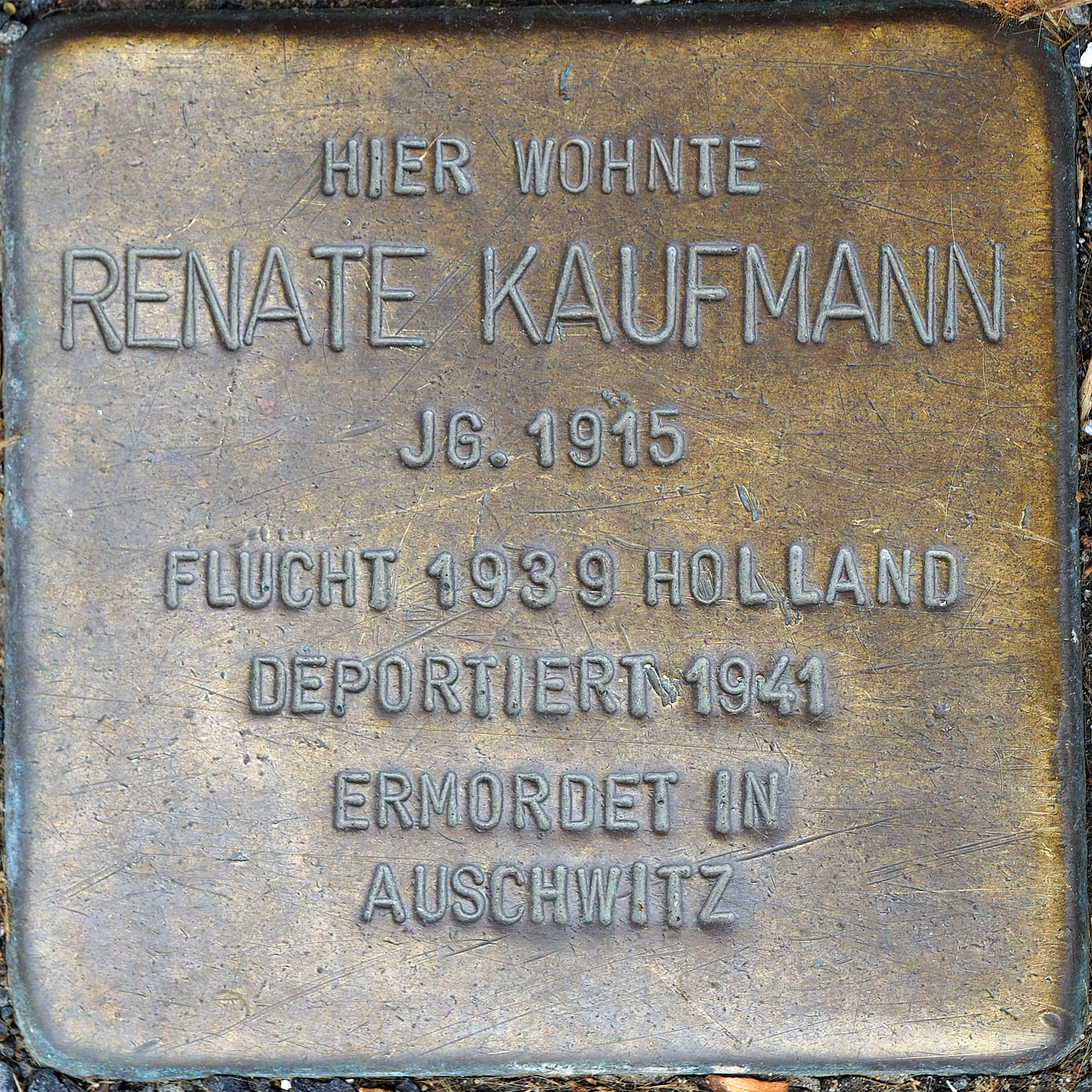 Stolpersteine MG: Kaufmann, Renate